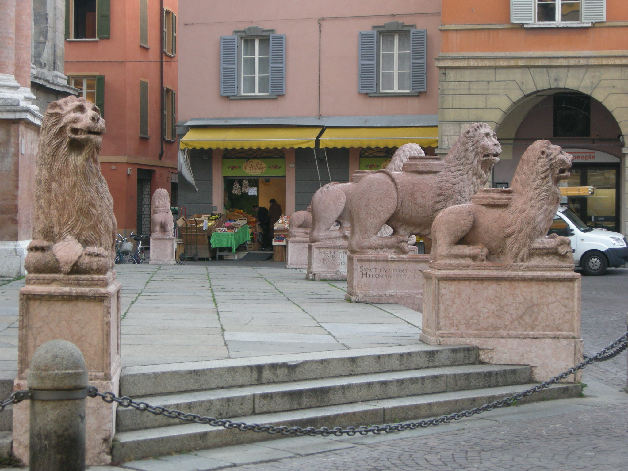 San Prospero (Reggio Emilia), leoni